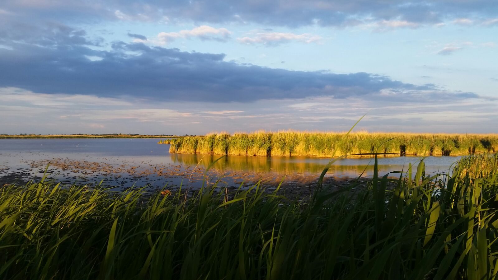 Schilfgürtel des Illmitzer Nationalparks